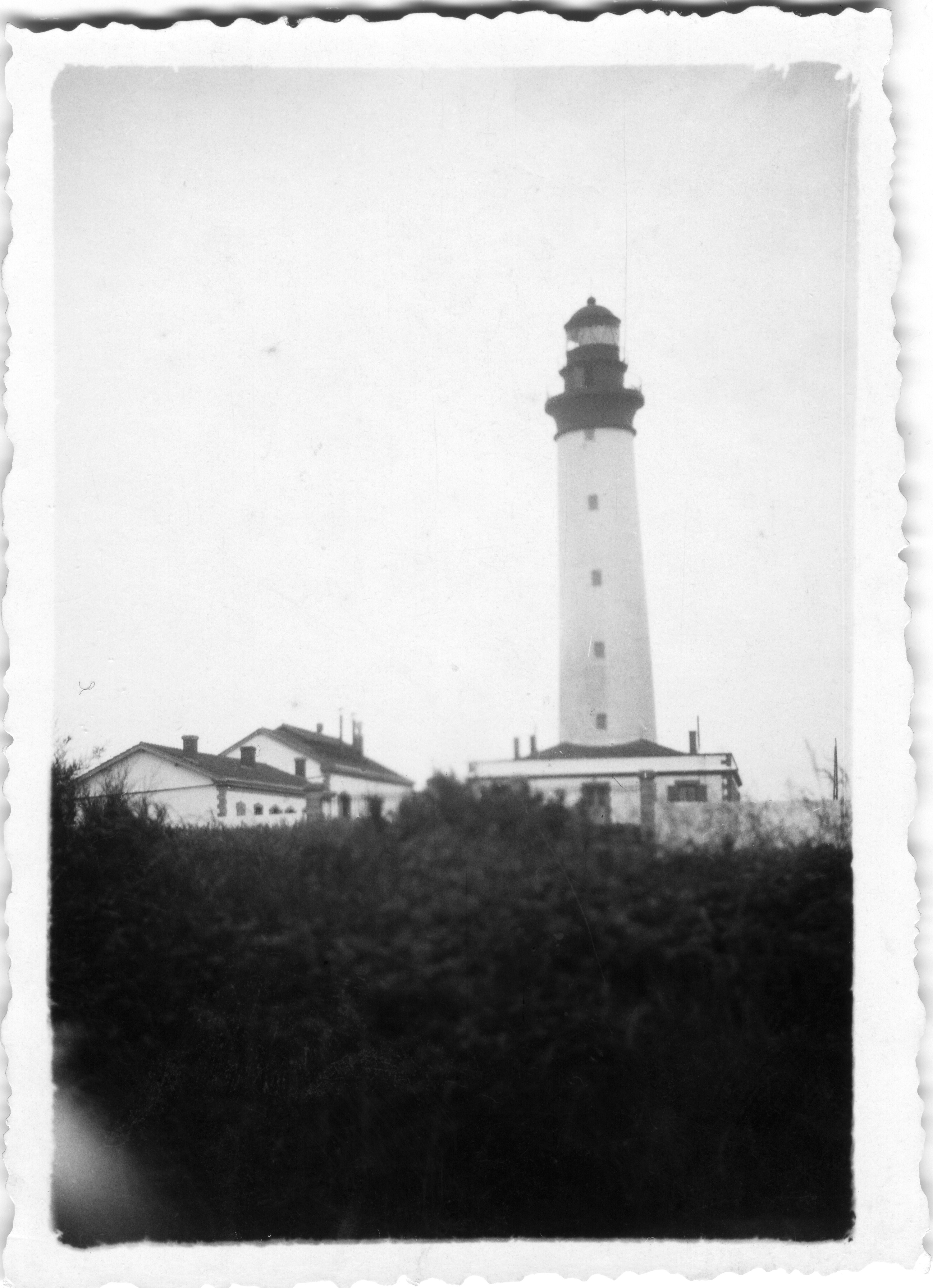 Cette photographie représente le premier "Phare de L' Île-d' Yeu" (appelé plus communément "Grand Phare") construit à partir de 1830. Ce phare était constitué par tour cylindrique en maçonnerie lisse centrée sur un soubassement de forme carrée. Le feu fut à huile jusqu' en 1895, date à laquelle un feu tournant électique fut installé. Hauteur de la tour: 33 mètres (hauteur au dessus de la mer: 54 mètres). Le Phare de L'Île-d' Yeu de 1830 fut détruit par les troupes allemandes en août 1944. Un second "Phare de L' Île-d' Yeu" a été construit en 1950. L' Île-d' Yeu (La Petite Foule), Vendée, France